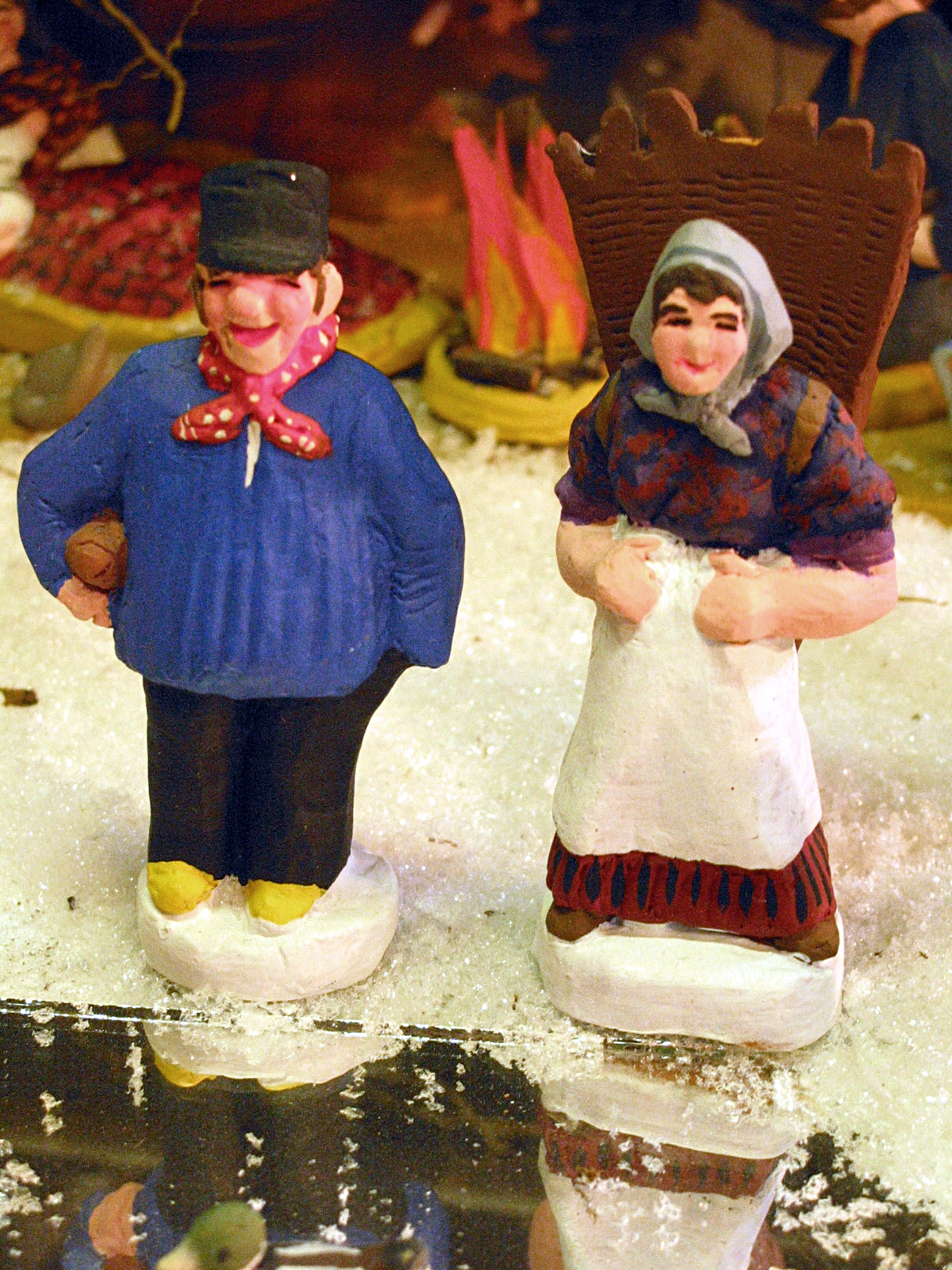 Tchantchès et Nanesse. - Santons wallons de Robert Noirhomme. Walon: Tchantchès et Nanèsse. - Santons walons di Robert Noirhomme.